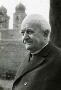 Prelát Franz Wagner v poválečném Německu